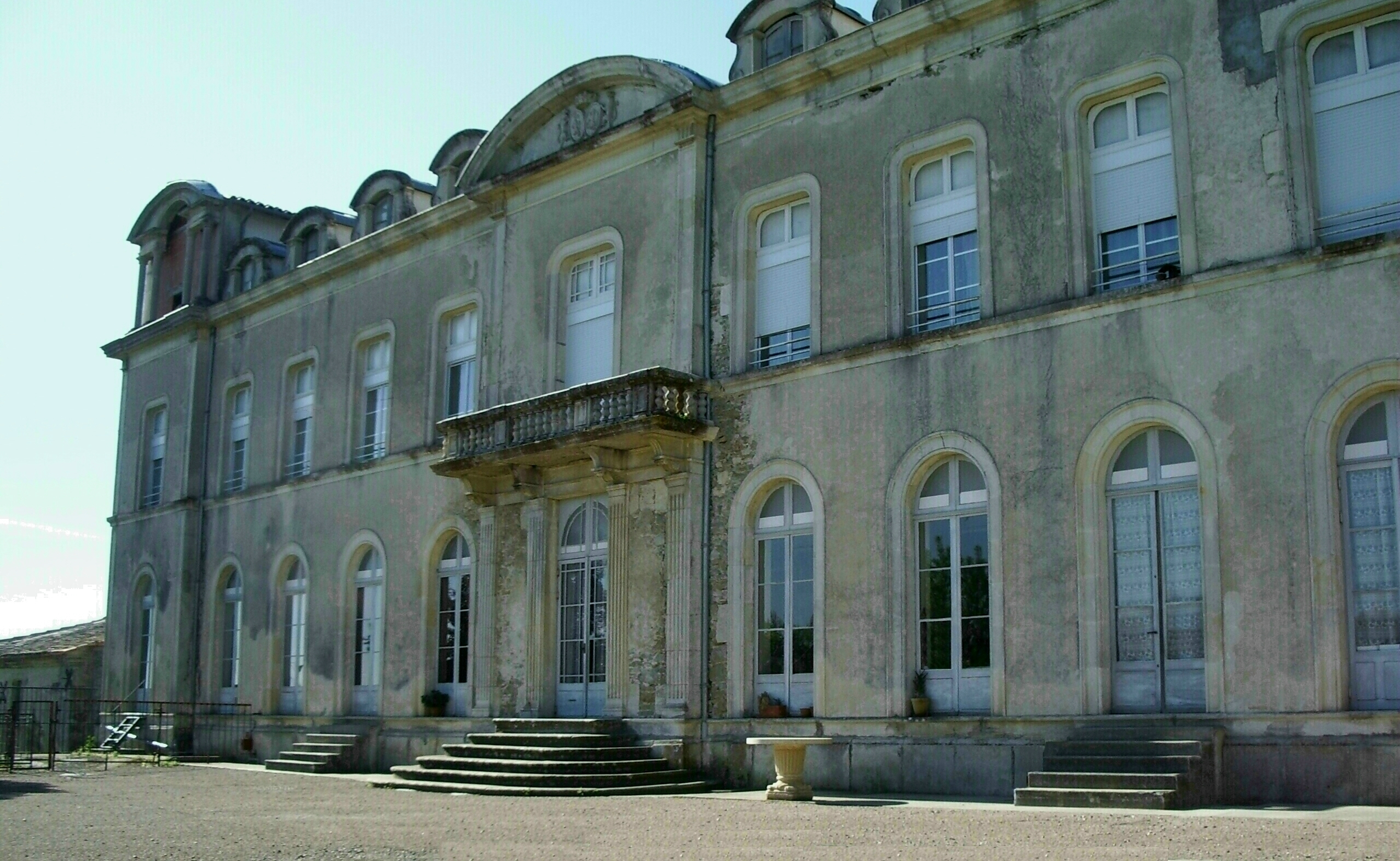 Facade du Chateau de Fendeille